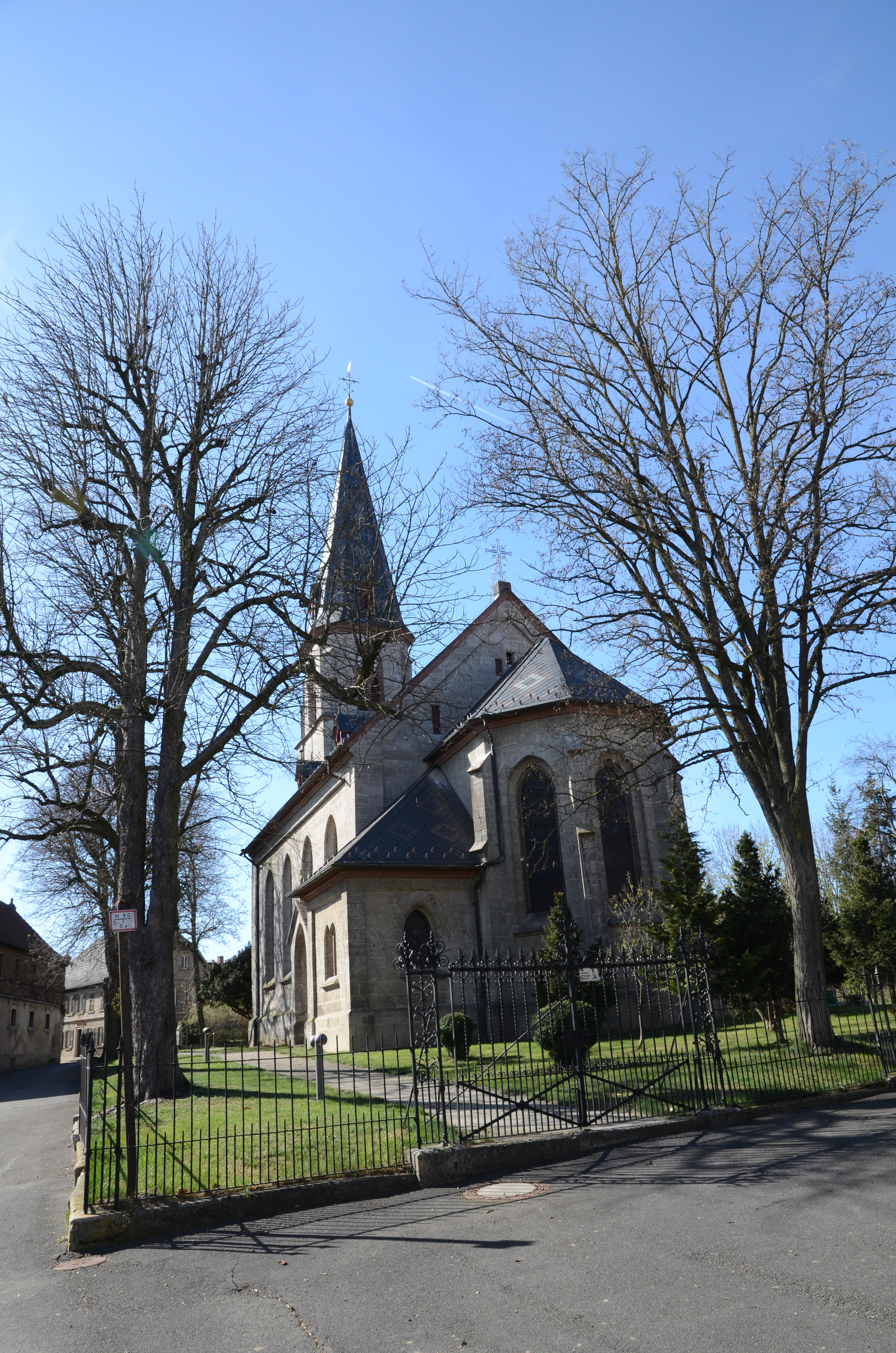 evang.-luth. Kirche in Westheim